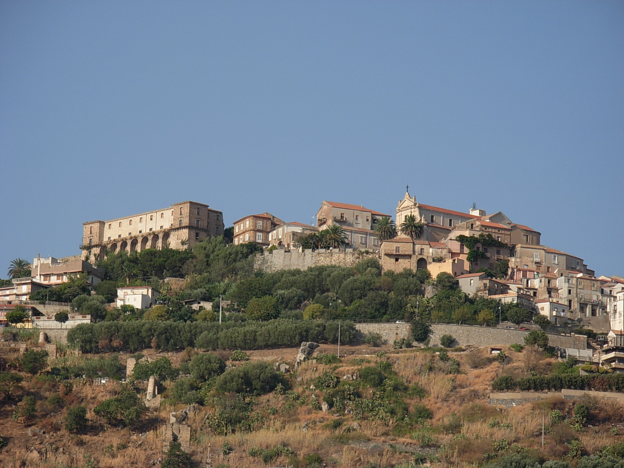 Vista_Nicotera_superiore